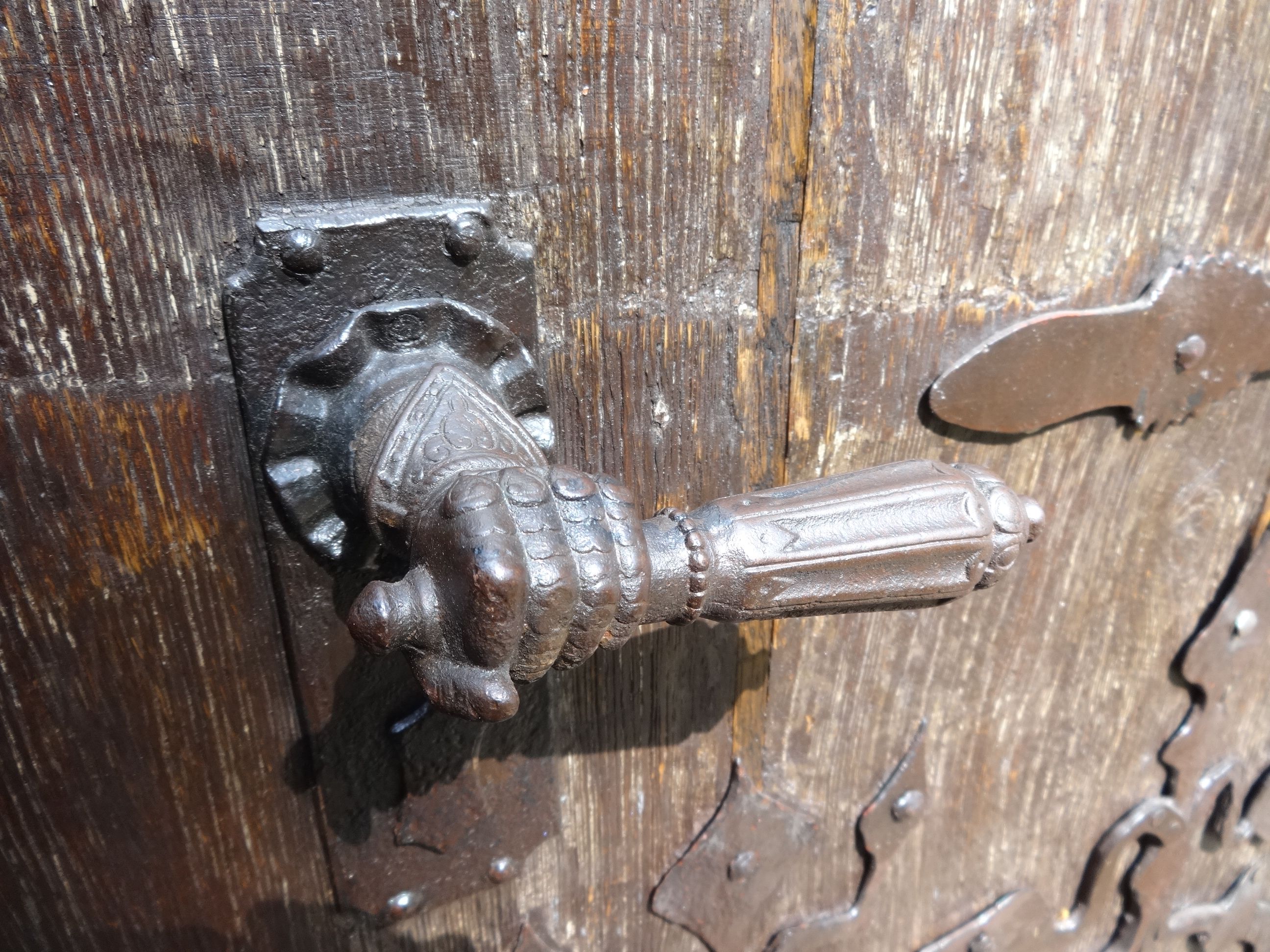 Die evangelische Dorfkirche Schenkendorf entstand vermutlich Ende des 14., Anfang des 15. Jahrhunderts. Die Feldsteinkirche wurde in den Jahren 1662 bis 1669 erheblich umgebaut. In seinem Innern befinden sich ein Altarrtabel und eine Kanzel aus dem 17. Jahrhundert sowie ein Schnitzaltar aus dem Jahr 1516. Er zeigt im geöffneten Zustand die Mondsichelmadonna, während im geschlossenen Zustand Nikolaus von Myra und Apollonia von Alexandria zu sehen sind.